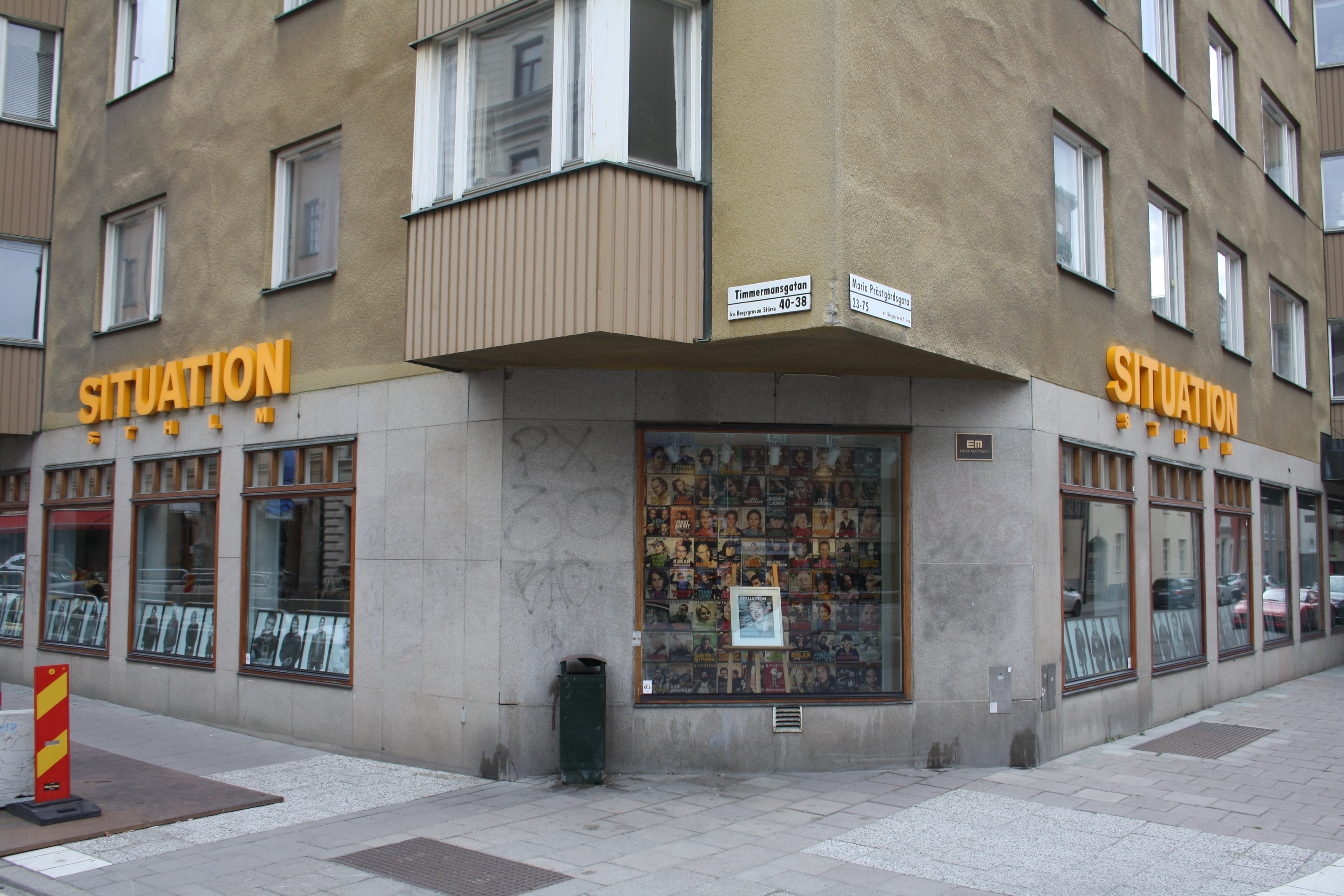 Situation STHLMs kontor